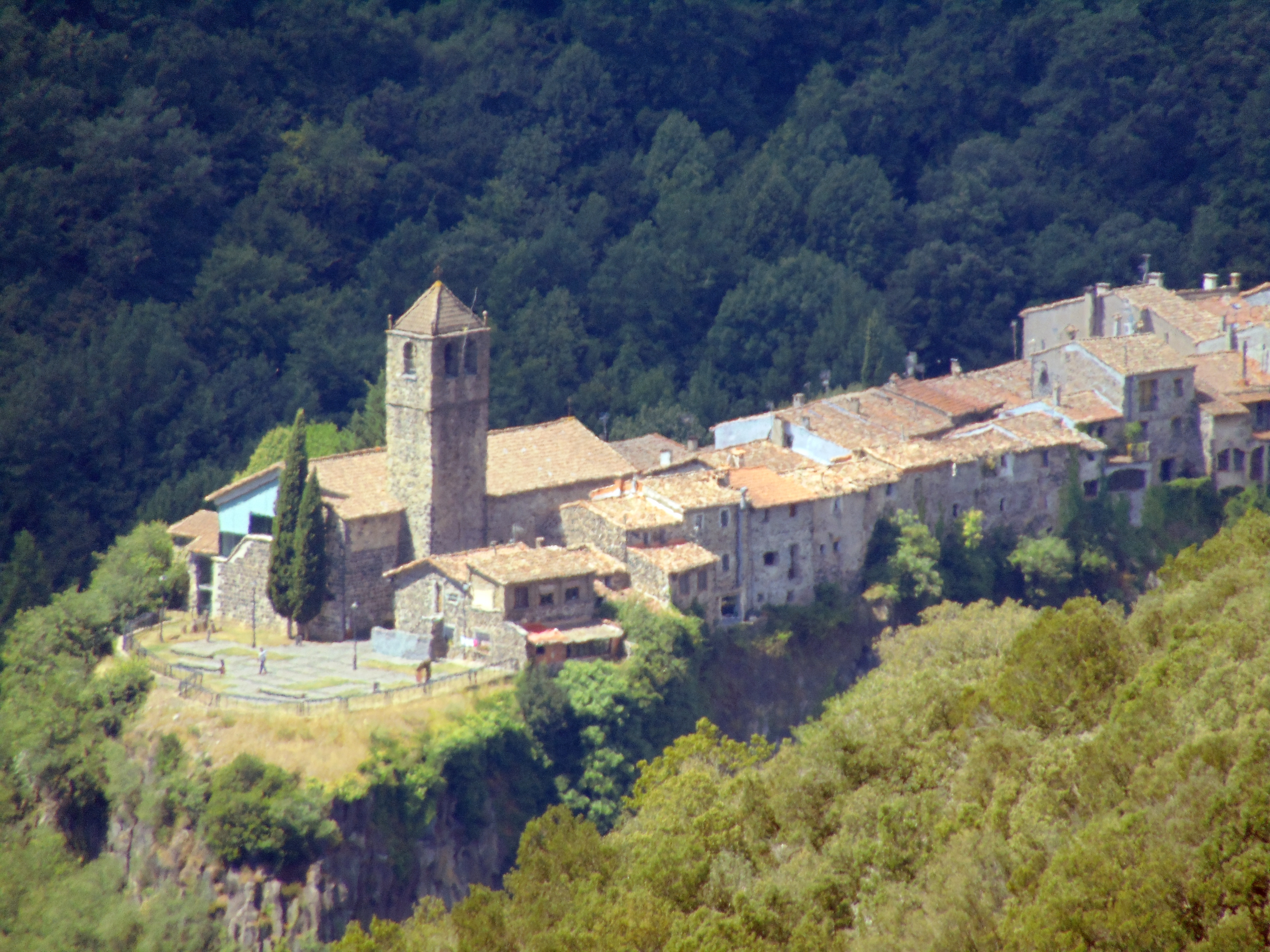 Castell i restes de muralles de Castellfollit (Castellfollit de la Roca i Sant Joan les Fonts)